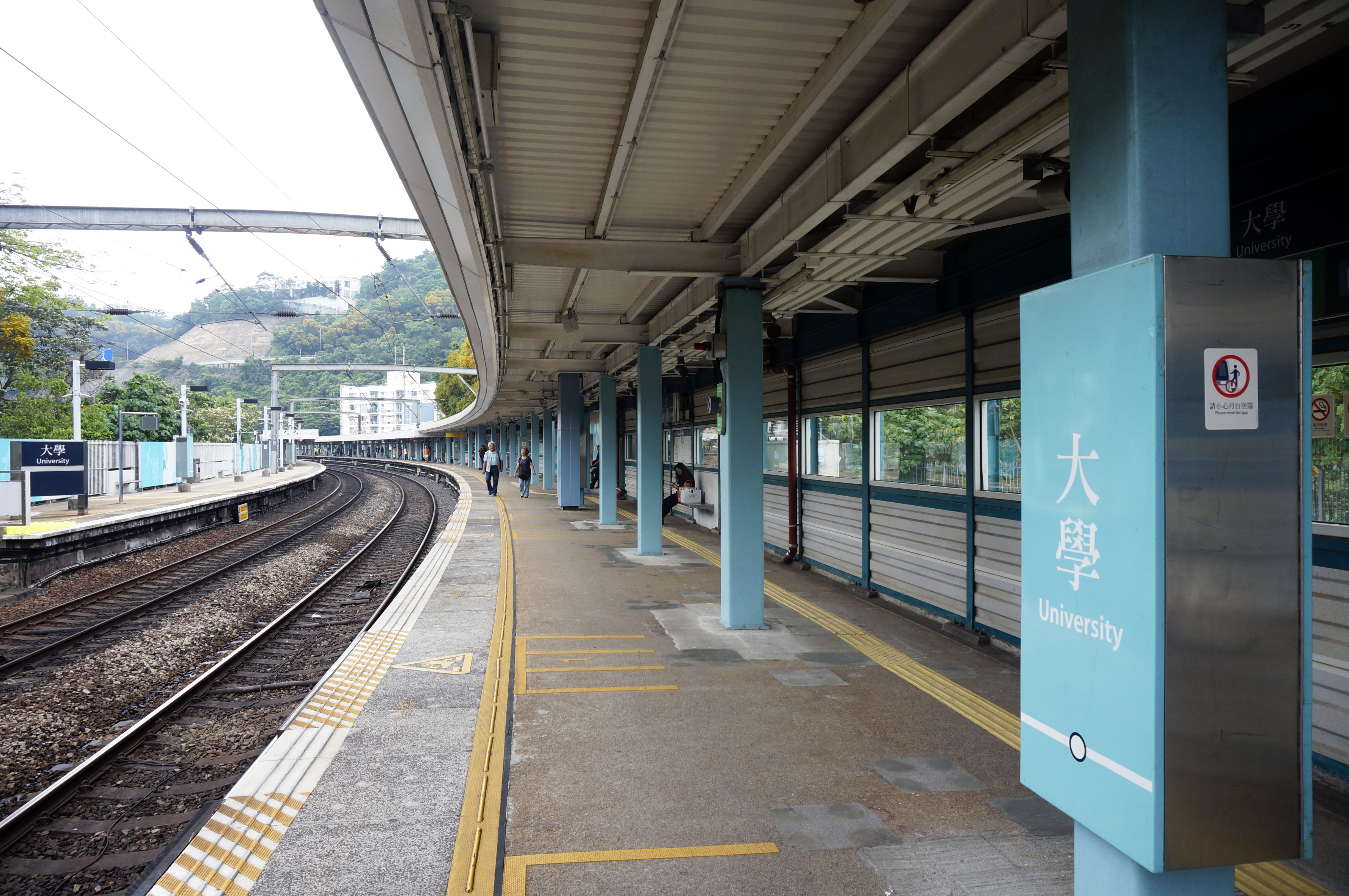 港鐵大學站月台